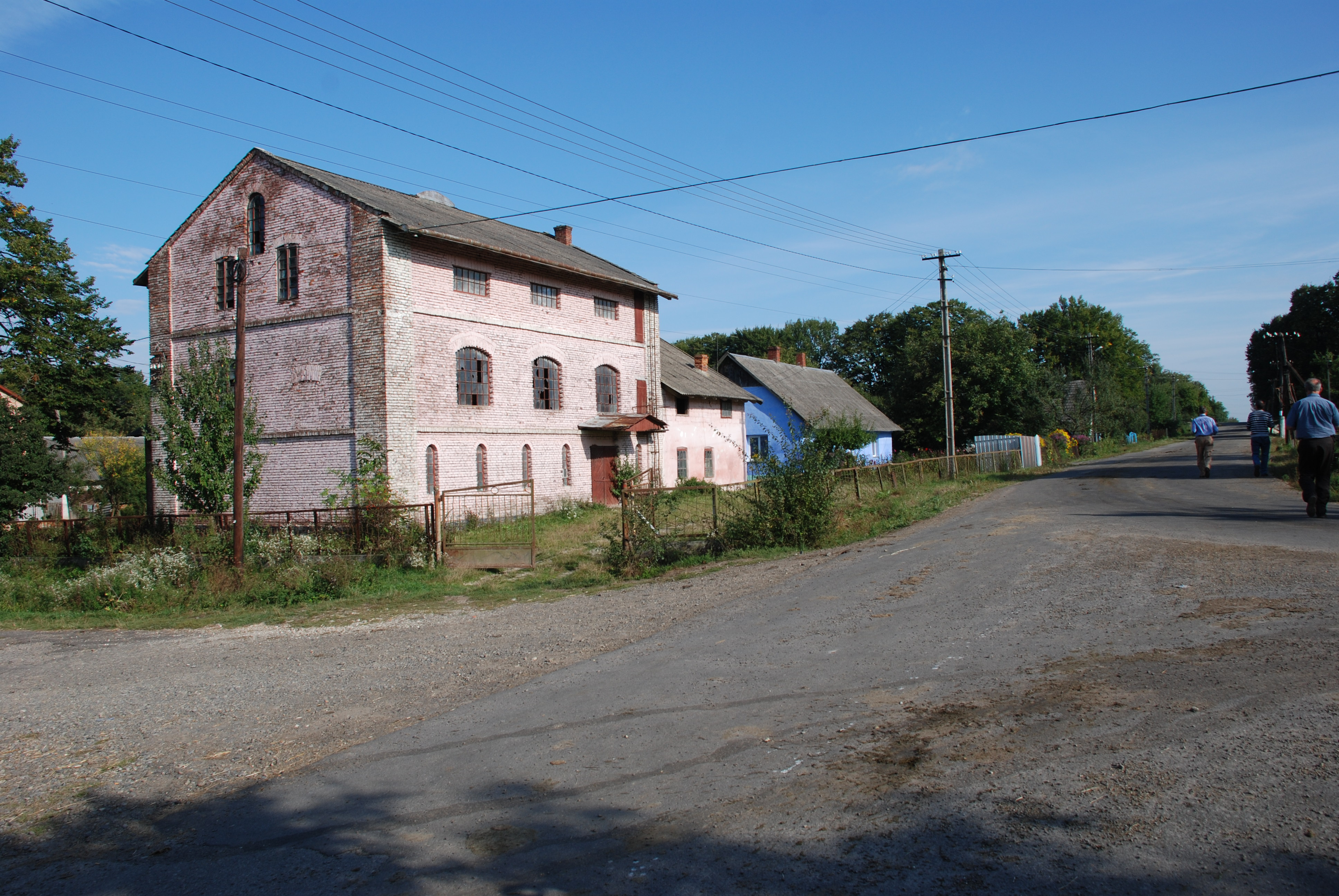 Dornfeld Muehle